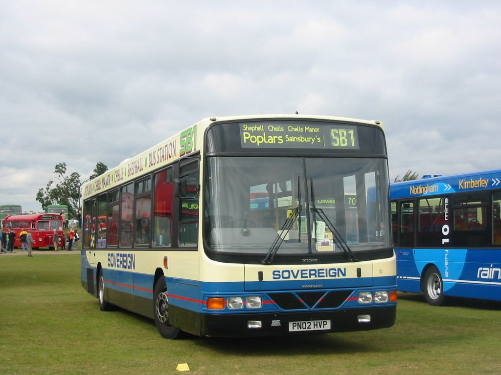 Sovereign 145 PN02HVP